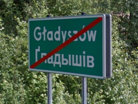 Tablica z nazwą po polsku i łemkowsku przy wyjeżdzie z Gładyszowa